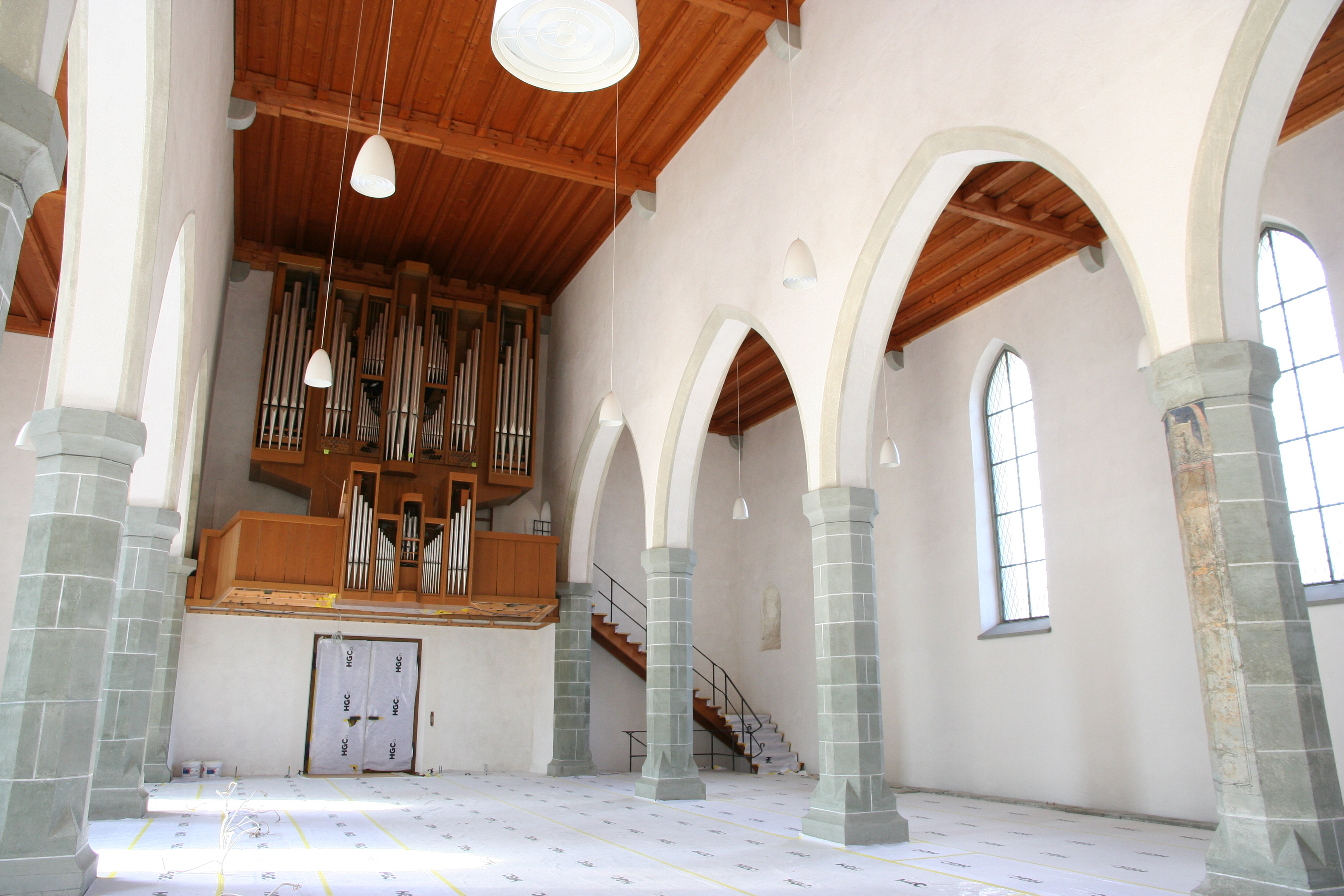 Evangelische Kirche Diessenhofen TG